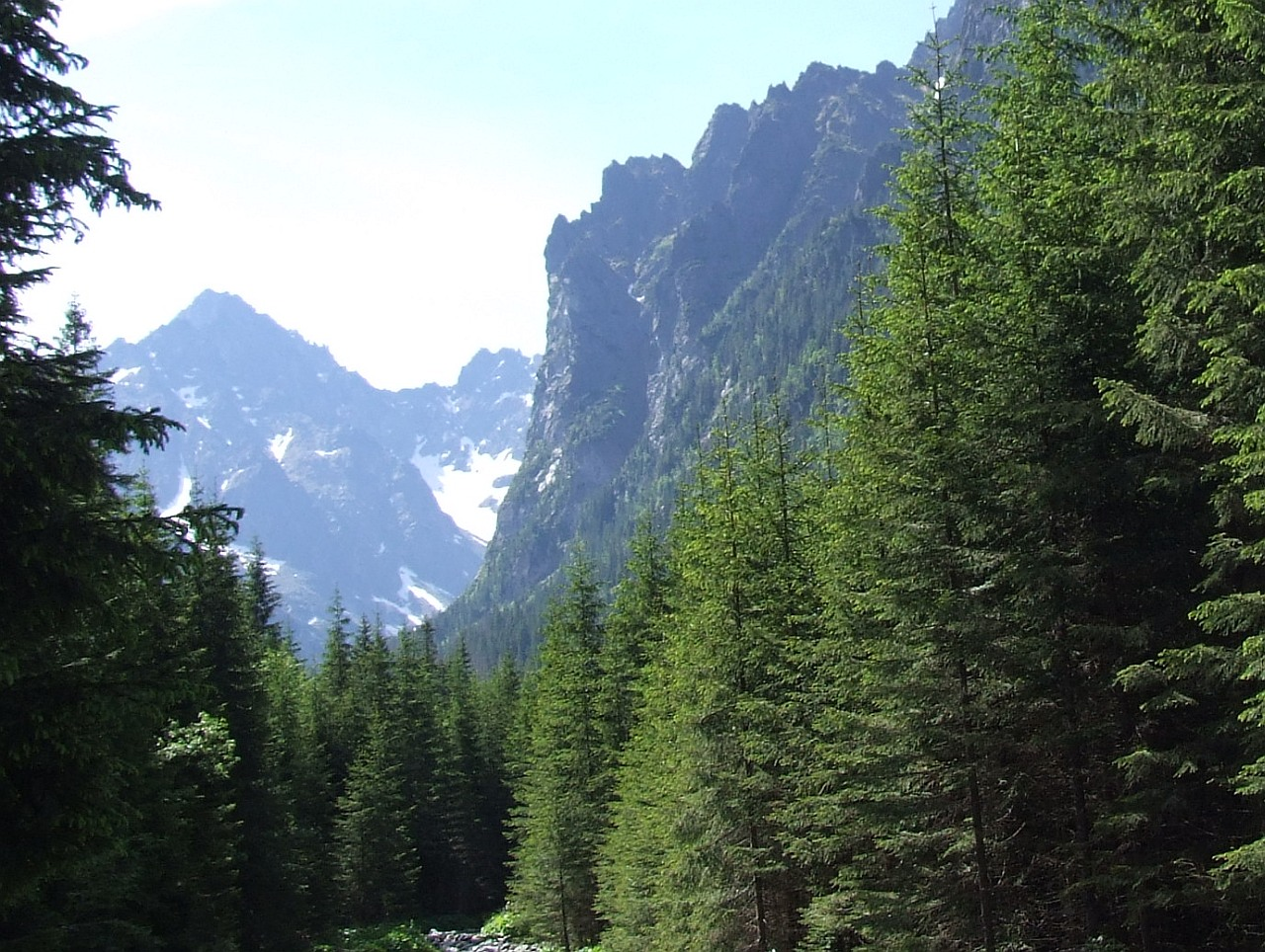 Dolina Białej Wody. Po prawej stronie Niżnia Młynarzowa Kopa i Nawiesita Turnia